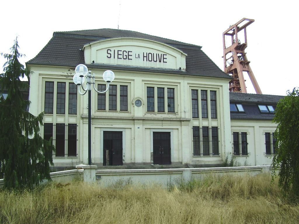 siege la Houve creutzwald